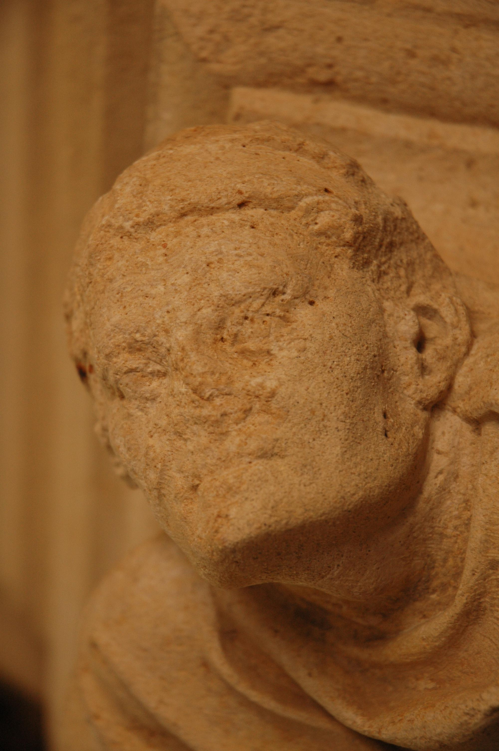 Tête sculptée redécouverte lors de travaux de fouille